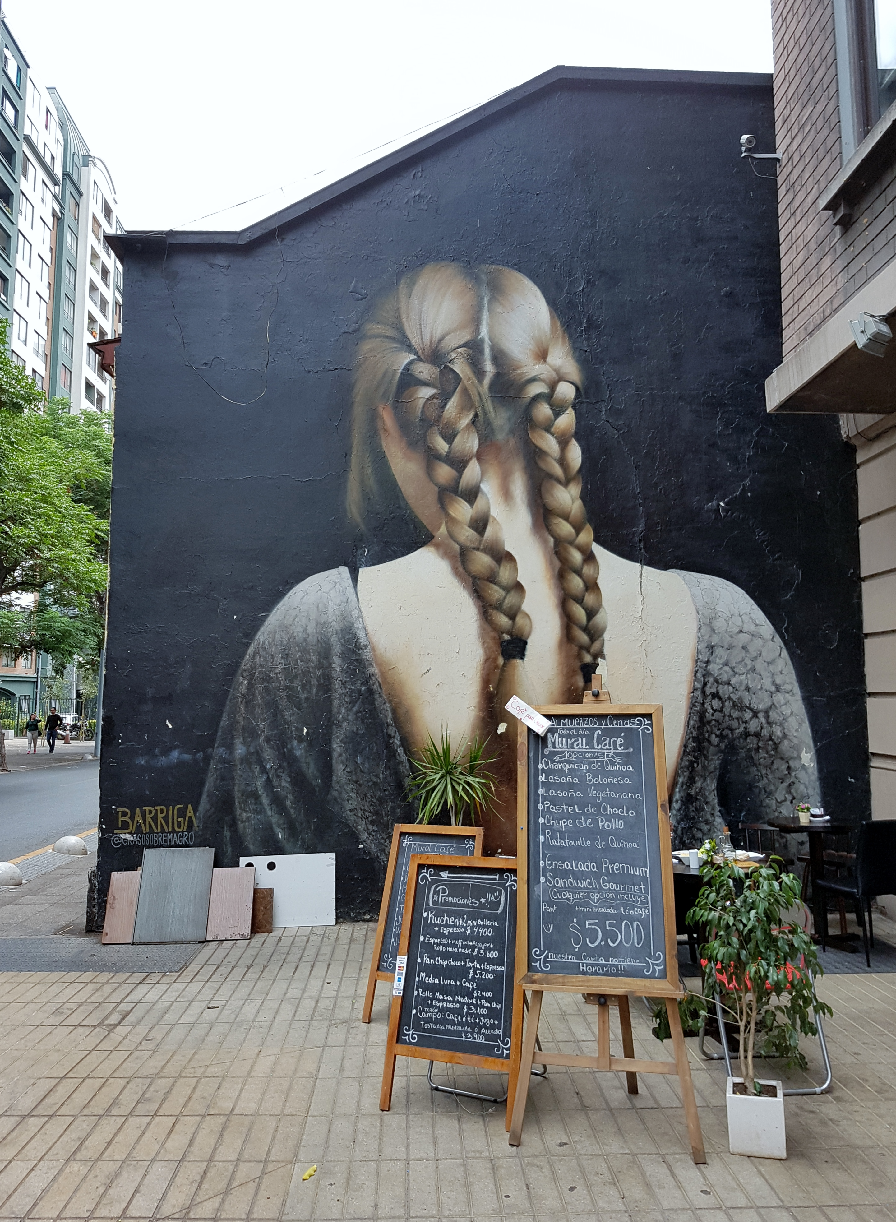 Ganza (Elisa Alcalde), mural de Javier Barriga en la calle Santo Domingo, junto al Mural Café (n.º 615), esquina Miraflores, barrio Bellas Artes, Santiago de Chile. La obra desapareció en octubre de 2019 cuando otro grafitero pintó un nuevo mural sobre el de Barriga [1]